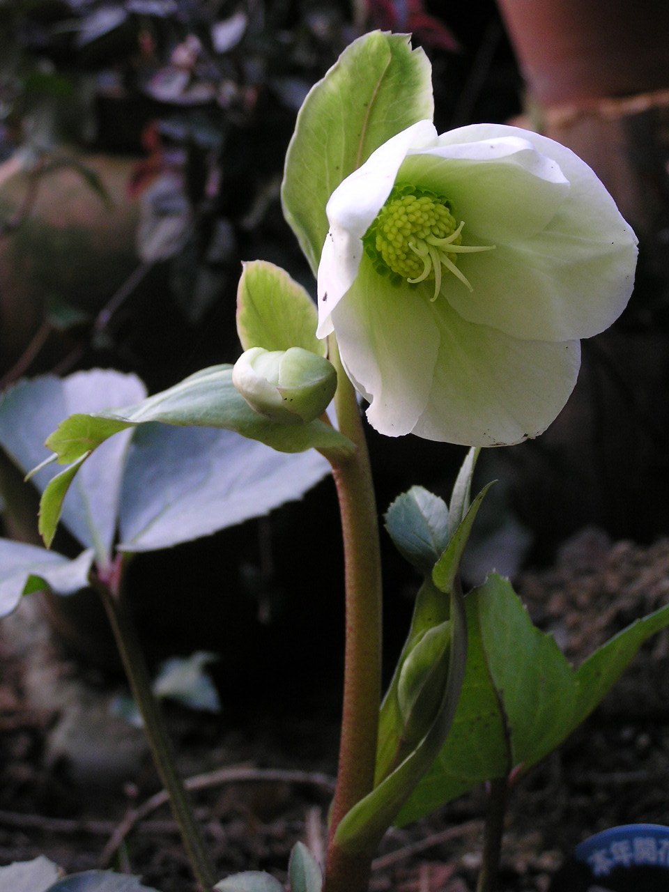 ニゲル Ｘ アーグティフォリウスの交配種 バレンタイングリーン 【おぉたむ すねィく探検隊】写真部門 担当 大原佳苗 ～photo by Autumn Snake